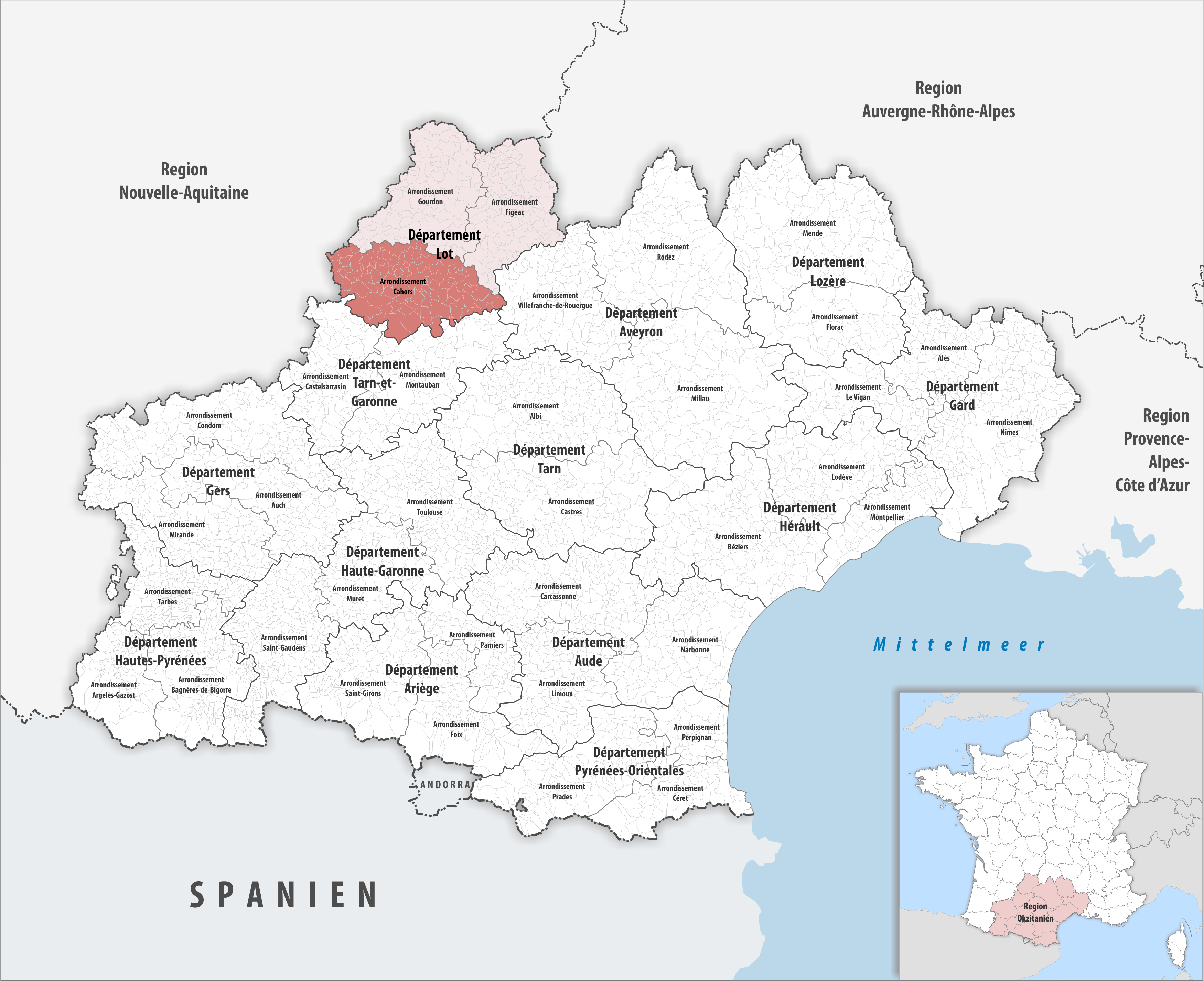 Lage des Arrondissements Cahors